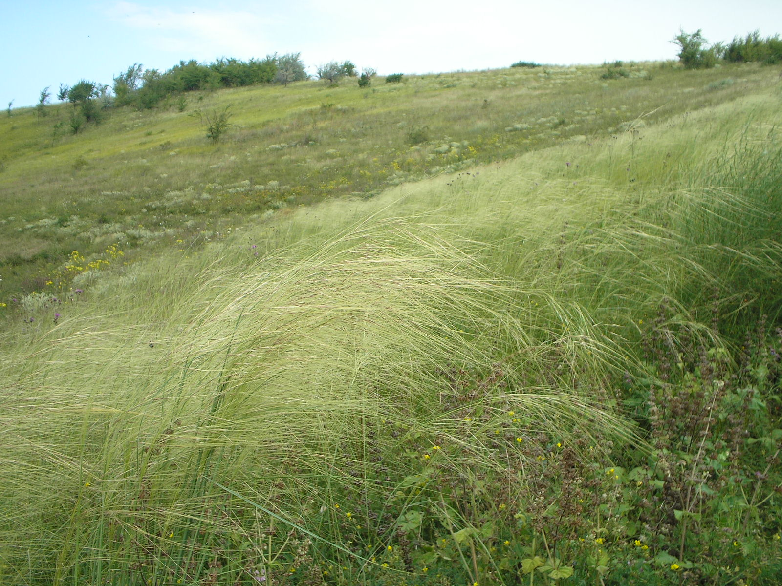 «Кармелюкове Поділля», Чечельницький район Бондурівська, Бритавська, Вербська, Демівська, Куренівська, Любомирська, Лузька, Стратіївська, Тартацька, Червоногреблянська сільські ради Чечельницької селищної ради Чечельницького району Тростянецький район с. Торканівка